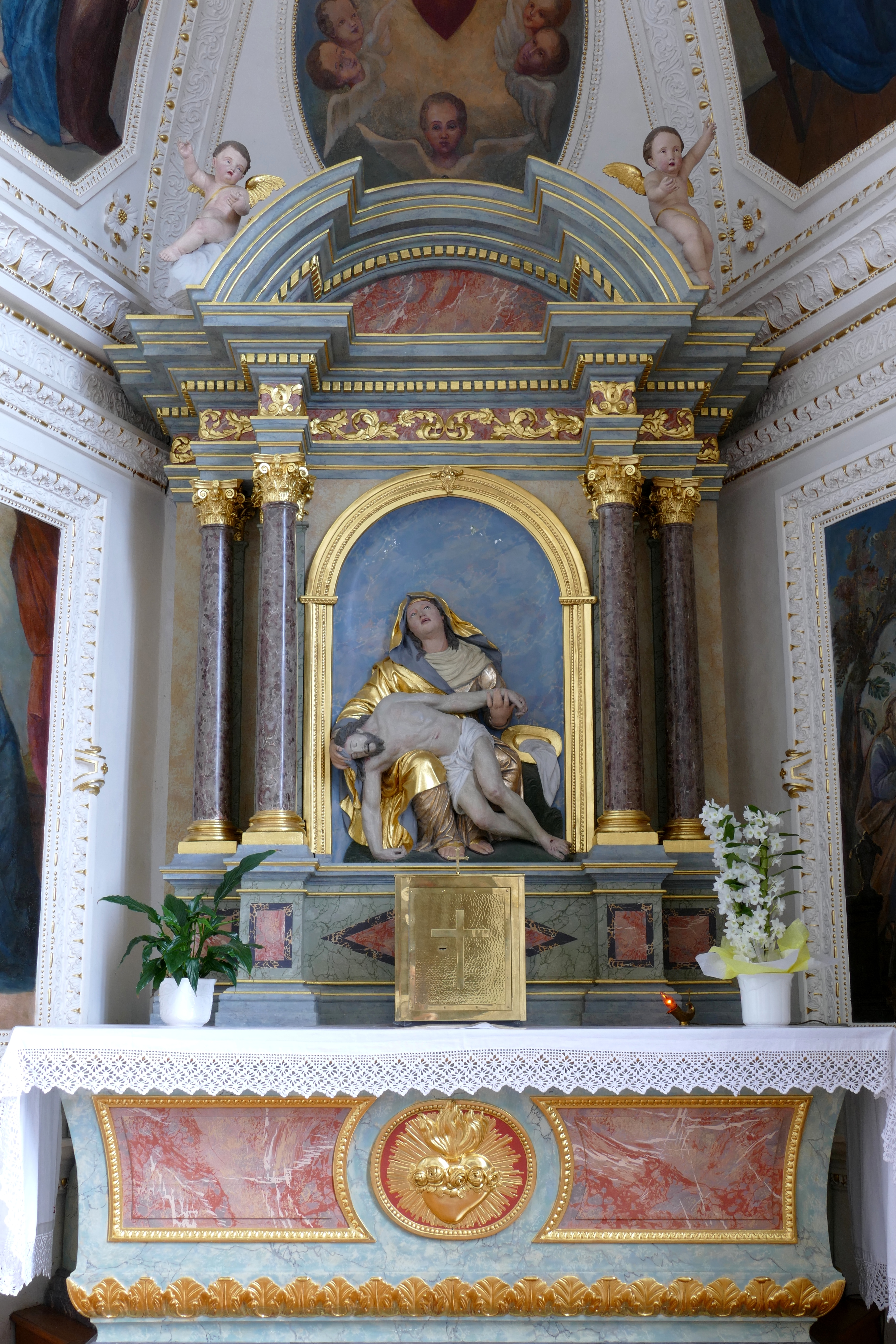 Alsace, Bas-Rhin, Église Saint-Georges de Molsheim, ancienne église des Jésuites (1618) (PA00084798, IA67006097): Transept sud. Autel-retable de la Vierge de Pitié (XVIIIe): This object is classé Monument Historique in the base Palissy, database of the French furniture patrimony of the French ministry of culture, under the references PM67000534 and IM67009669.